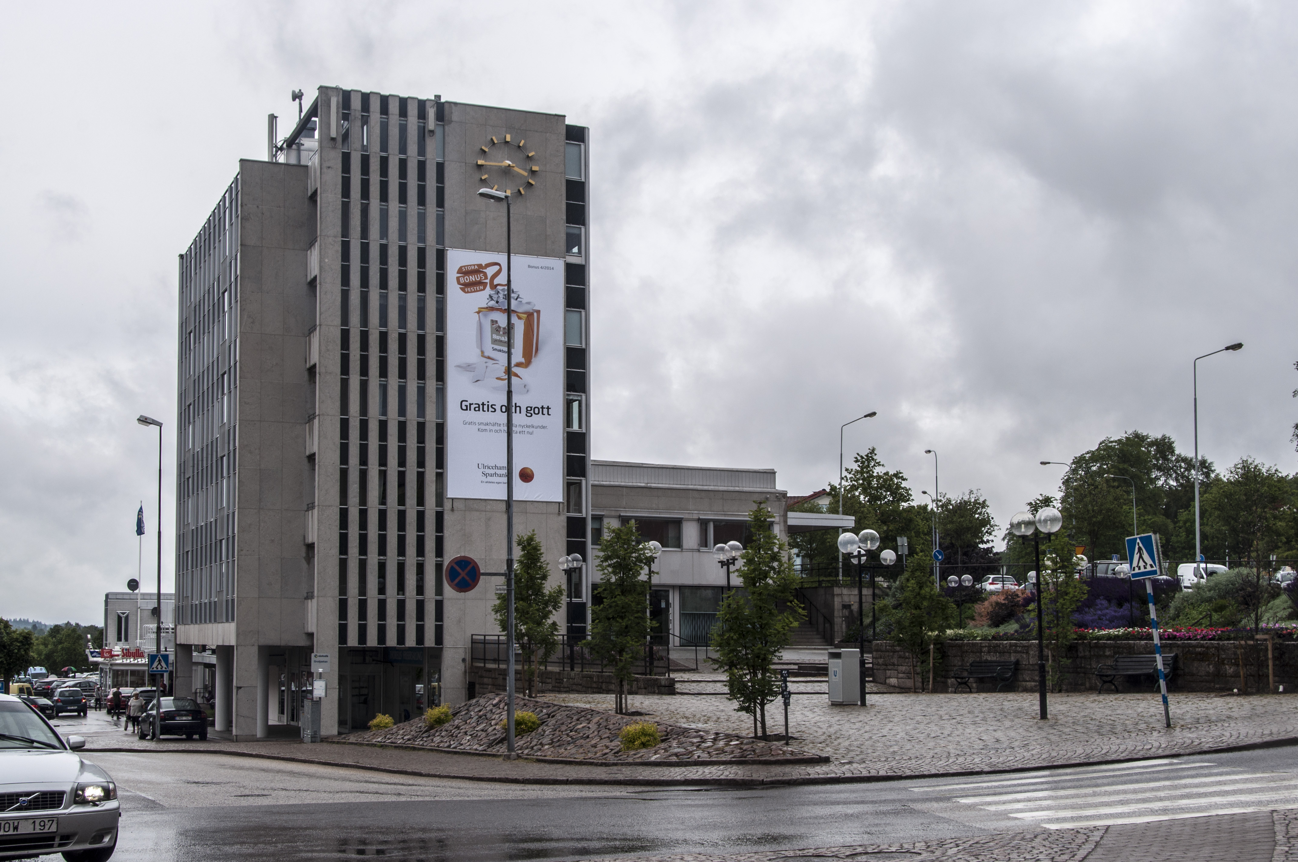 Ulricehamns sparbank, kv Tullen 10. Byggnadsår 1964-65. Sparbanksfrämjandets arkitektkontor/Sven Vejde